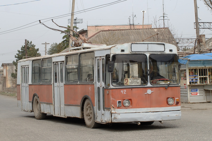 ZiU-9 42 in Gori